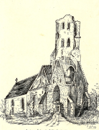 Photographie de l'ancienne église de Cellé d'après un dessin de M de Chauvigny (1837)